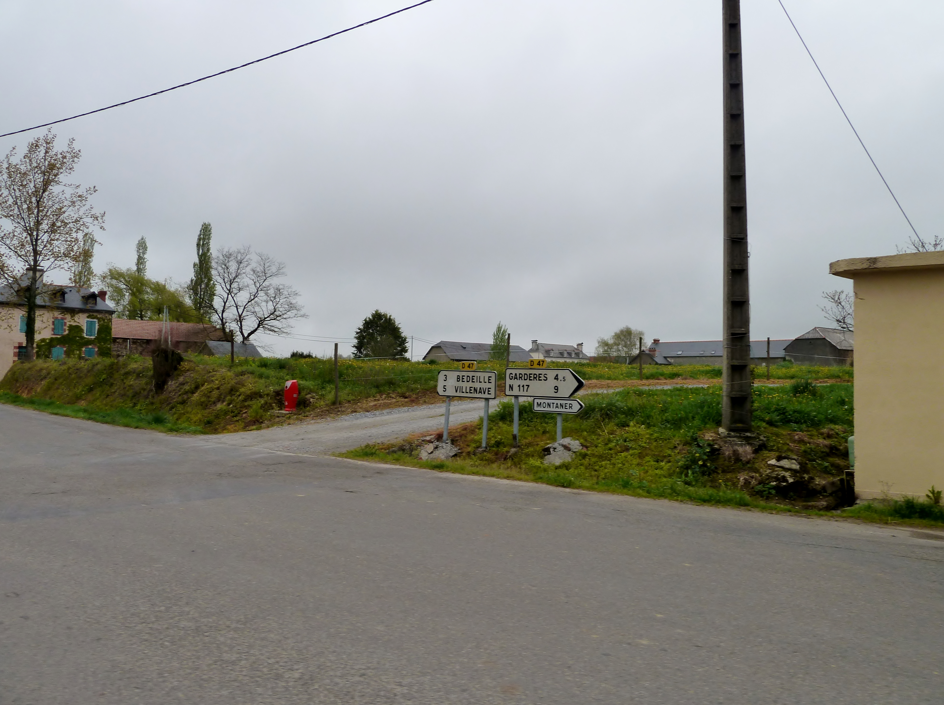 Séron